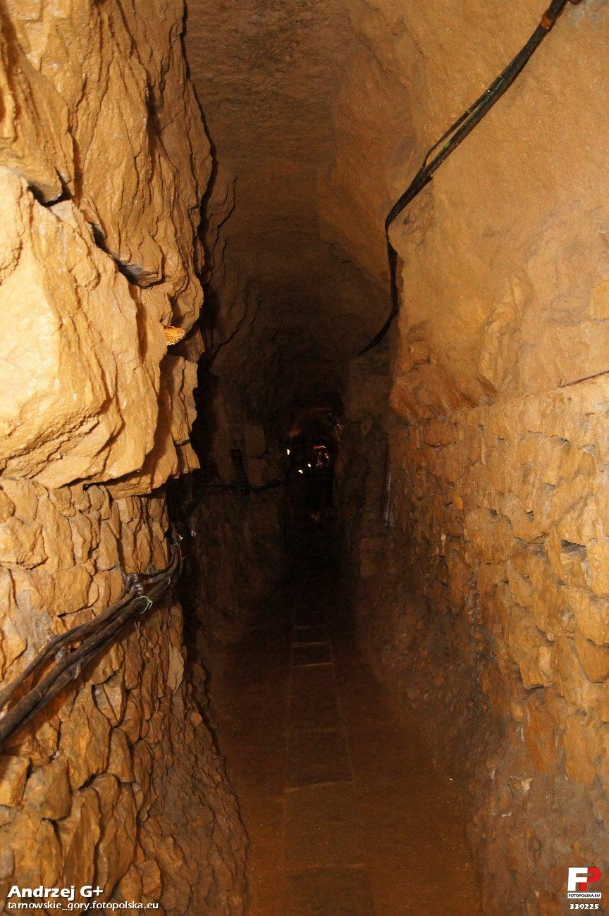 Chodniki komorowe wykonane w XVIII i XIX w.